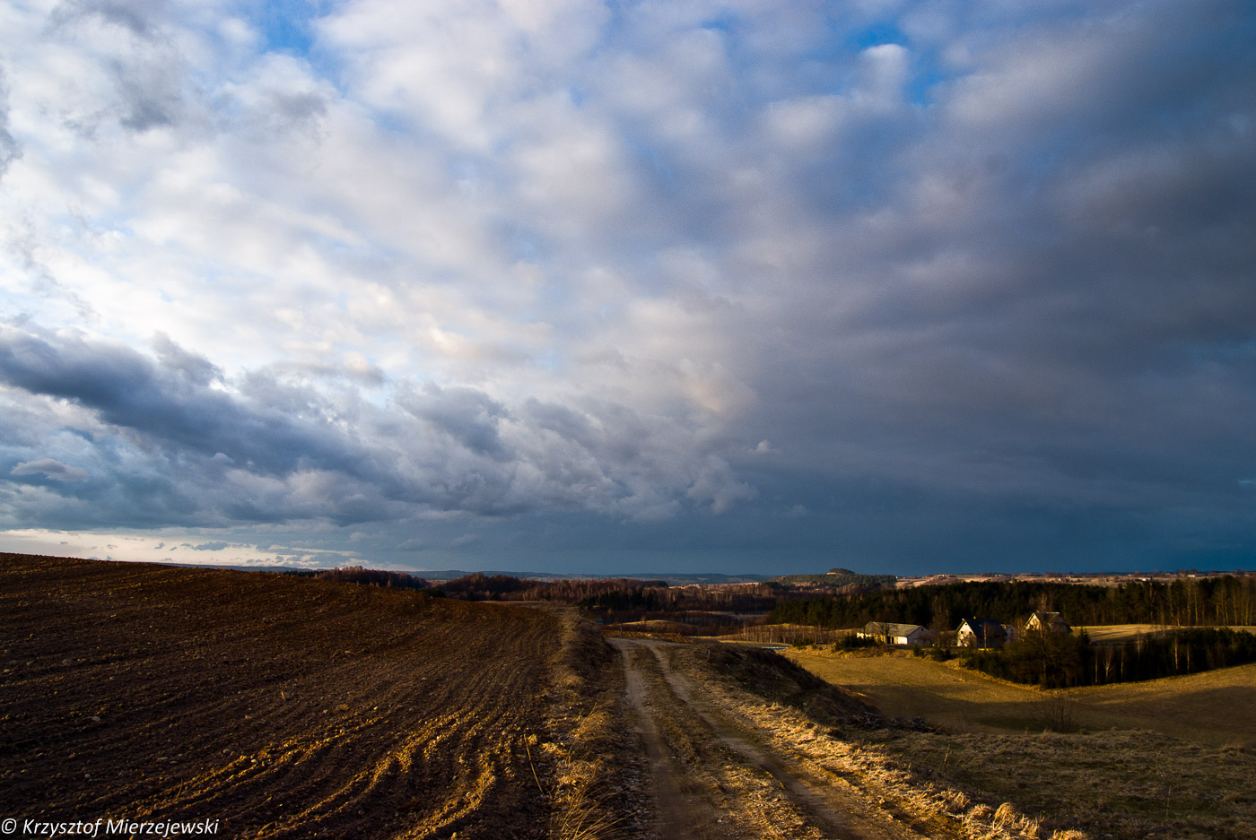 Widok na Cisową Górę, symbolu SPK.